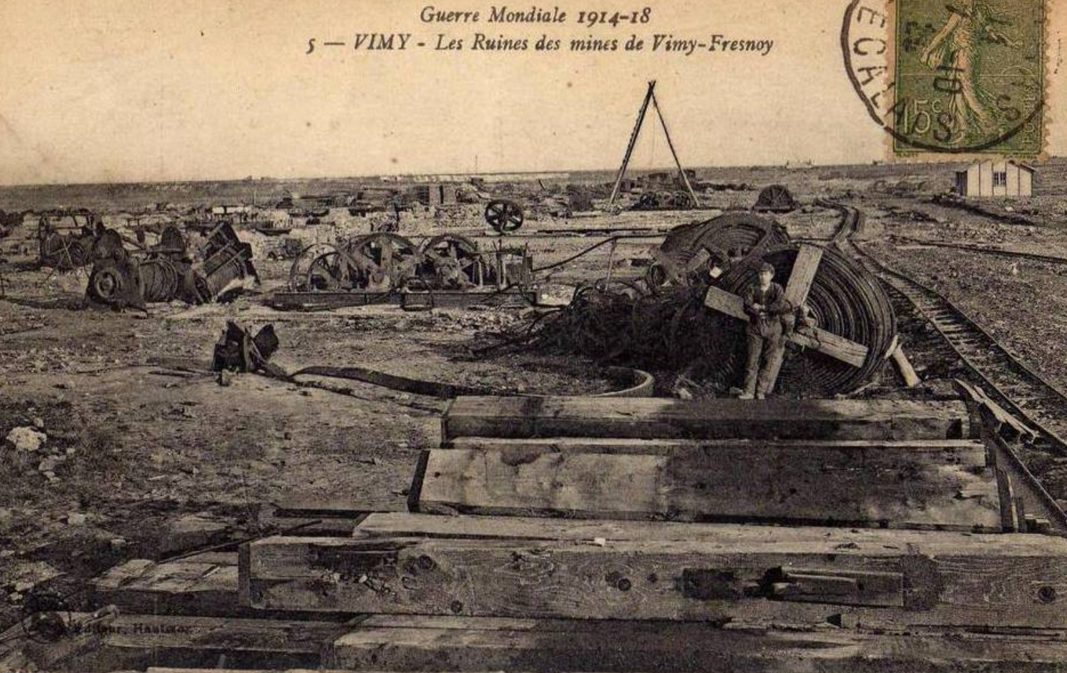 La Fosse n° 1 - 1 bis de la Compagnie des mines de Vimy-Fresnoy était un charbonnage constitué de deux puits situé à Vimy, Pas-de-Calais, Nord-Pas-de-Calais, France.